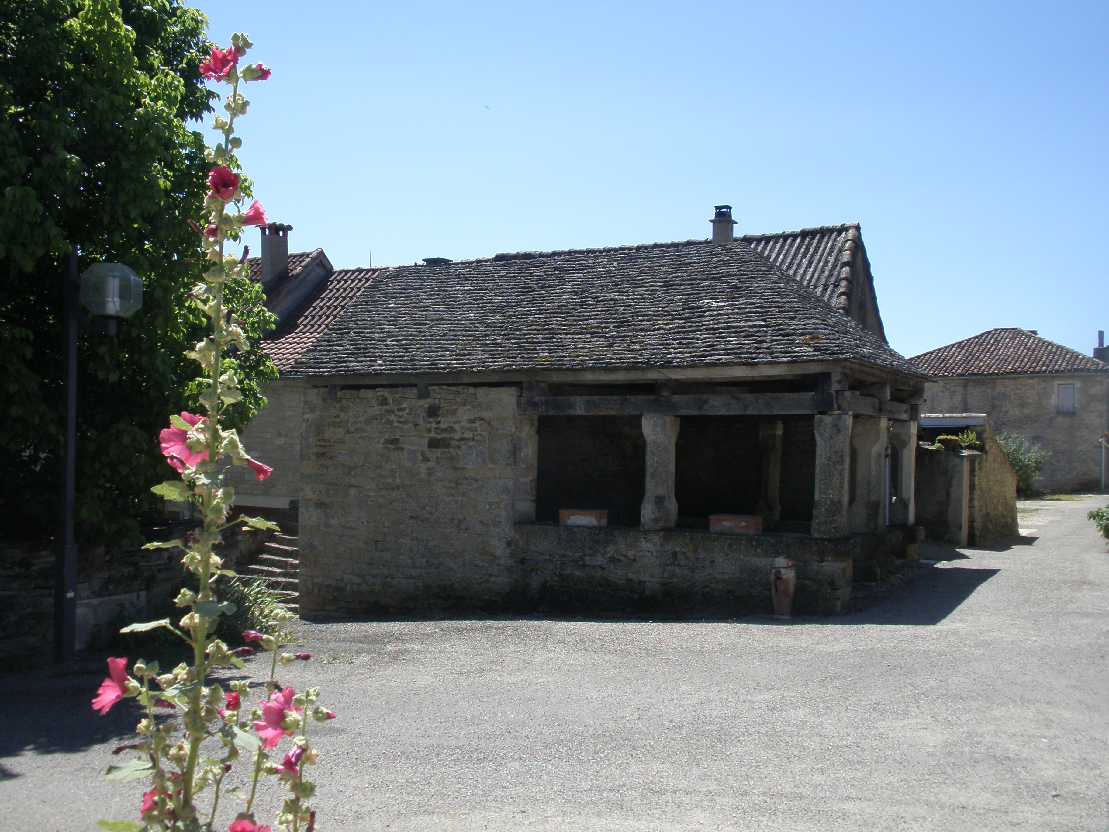 Halle de Lacapelle-Livron, (Classé, 1941) .